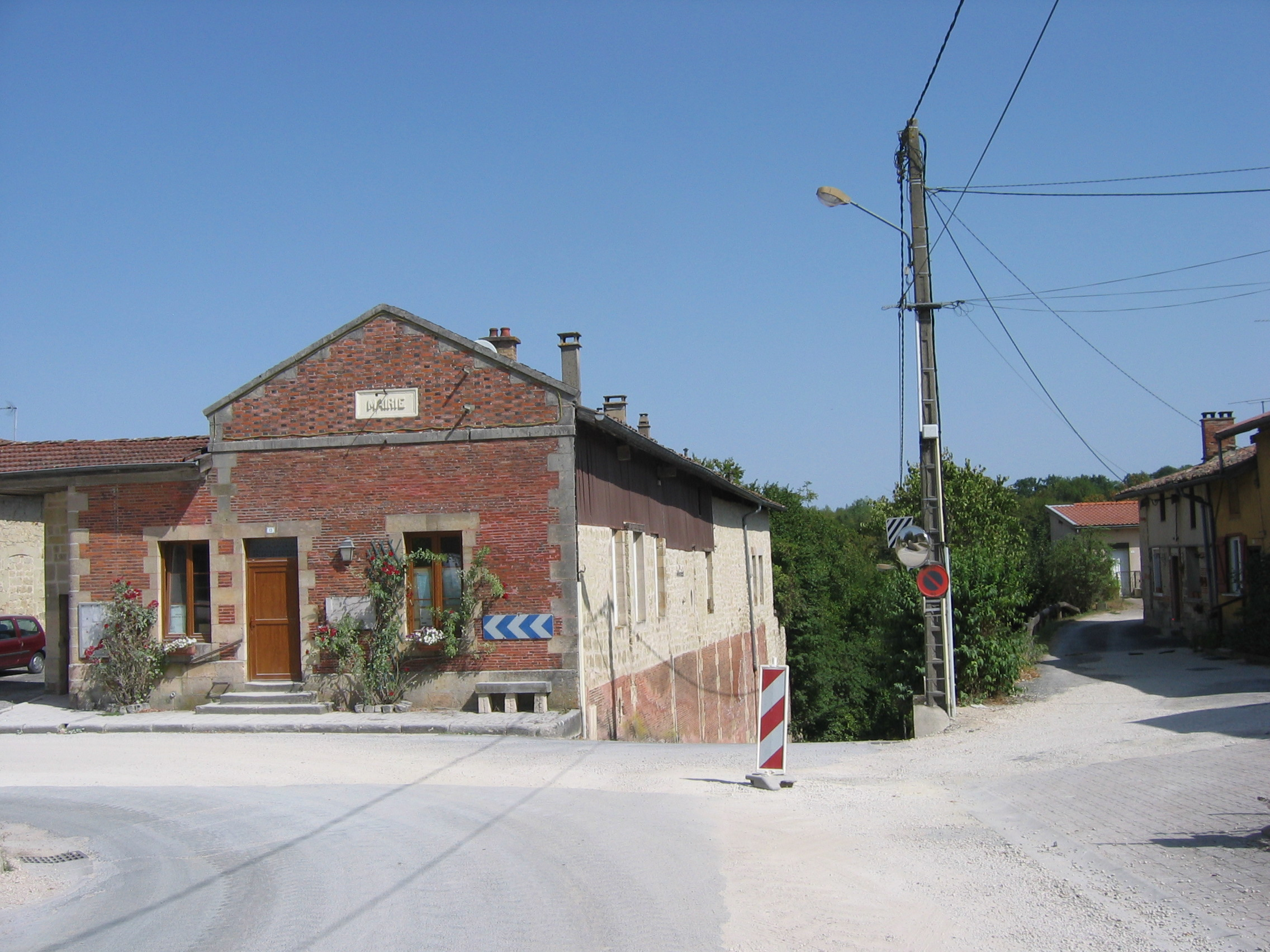 Mairie de Moiremont